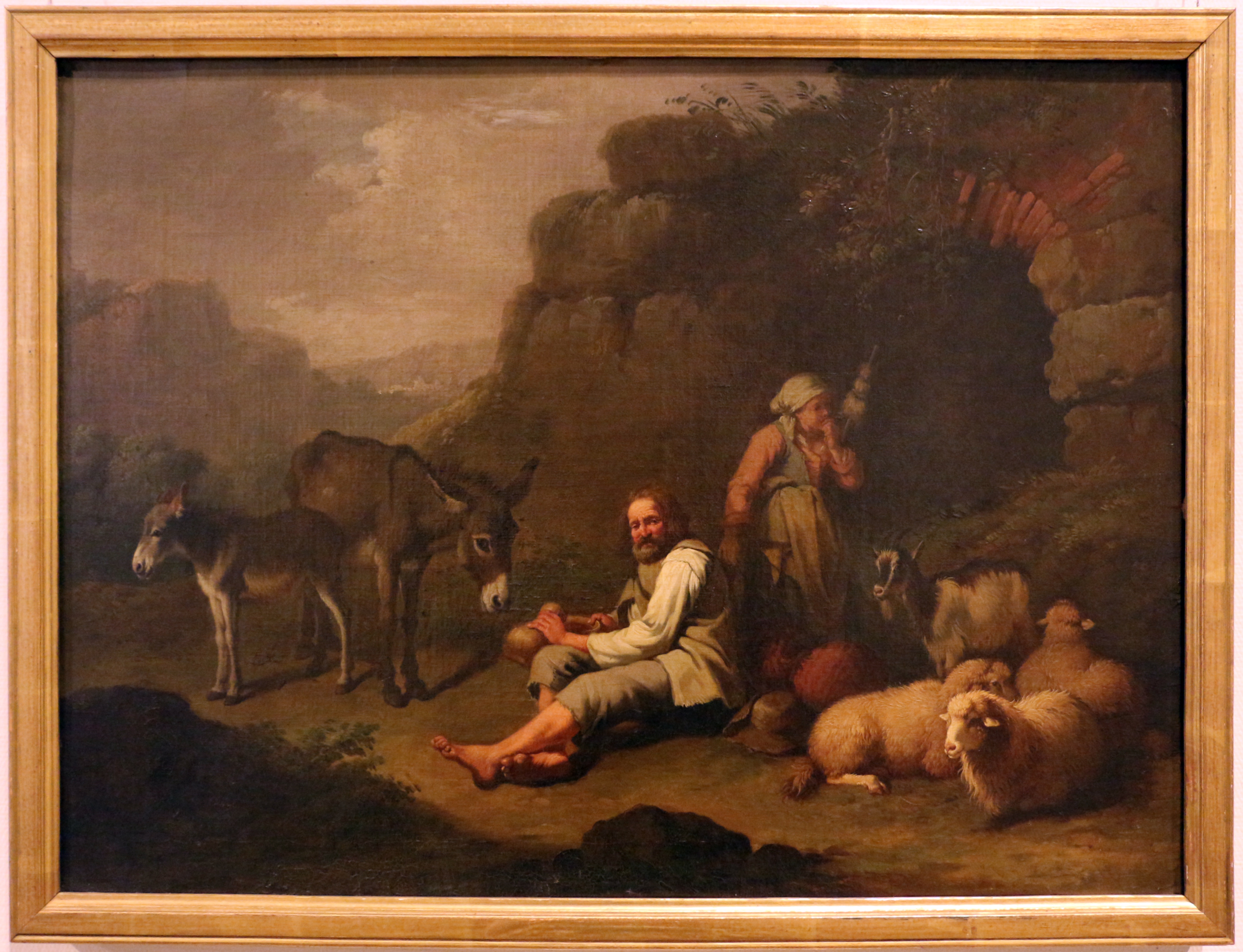 pastori con pecore e asinellititle QS:P1476,it:"pastori con pecore e asinelli" label QS:Lit,"pastori con pecore e asinelli"